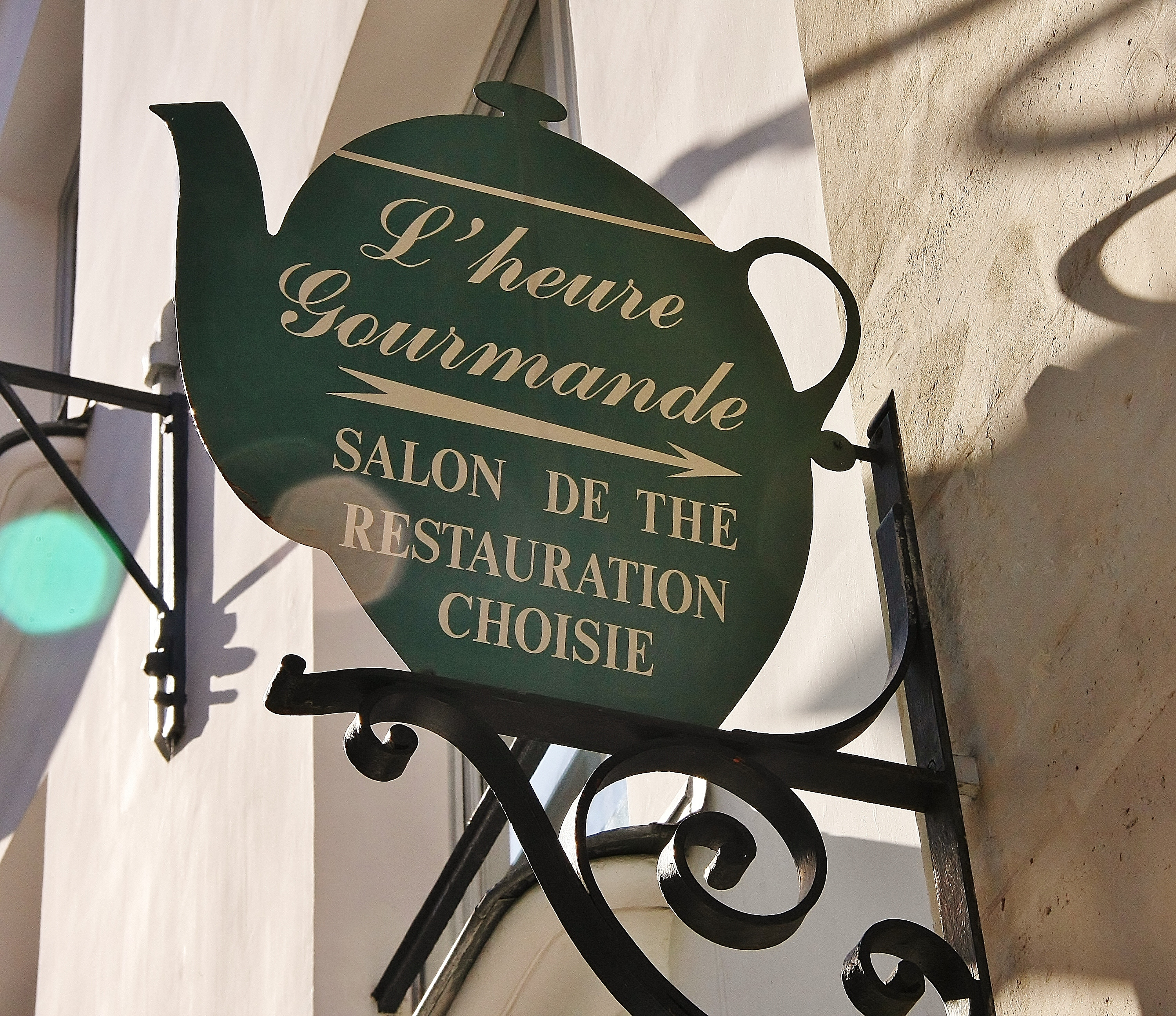 L’Heure Gourmande. 22, passage Dauphine, 75006 Paris.